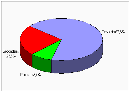 grafico degli occupati sardi ripartiti nei tre settori economici